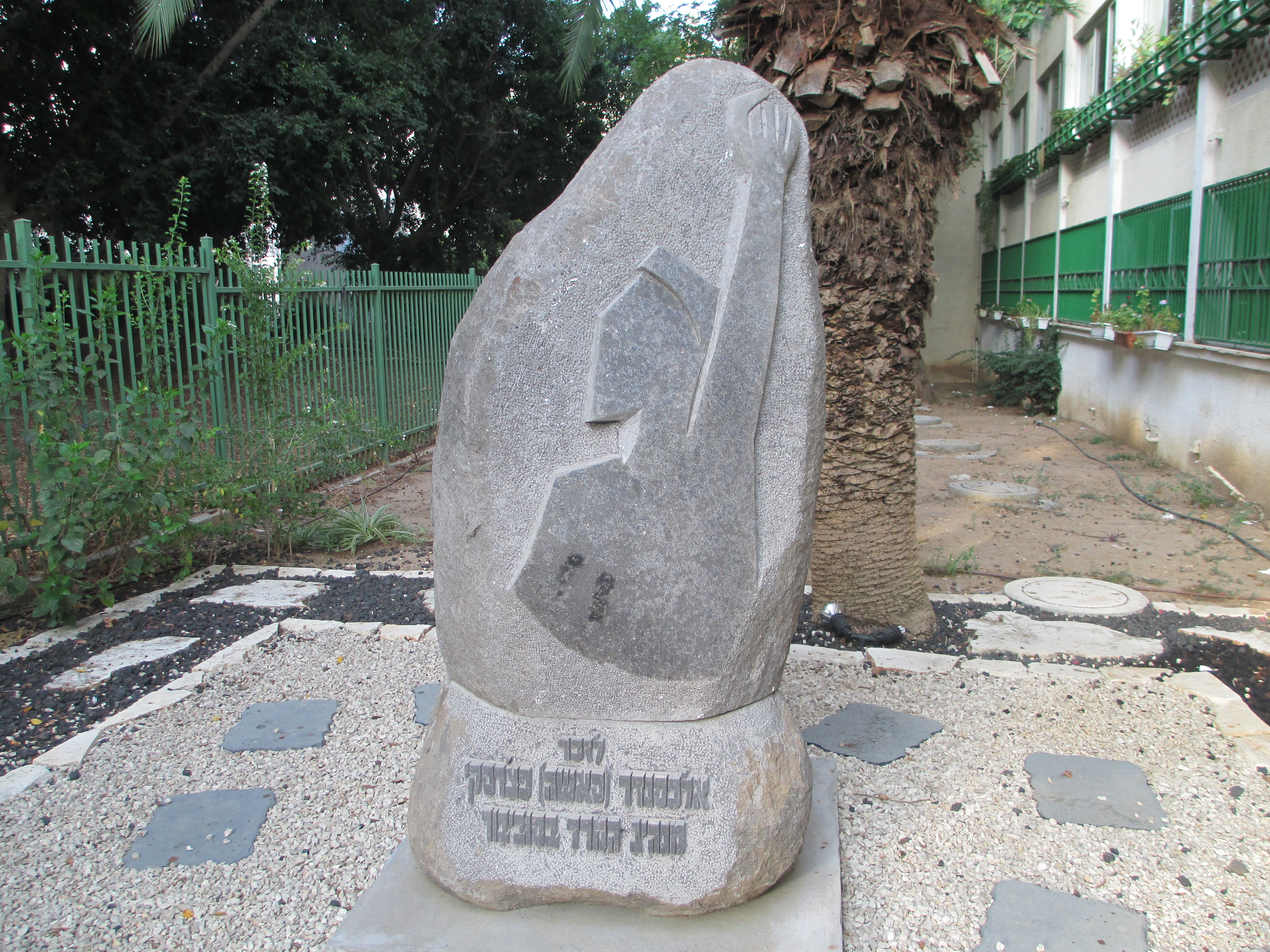 אנדרטה לאלכסנדר פצ'רסקי בתל אביב